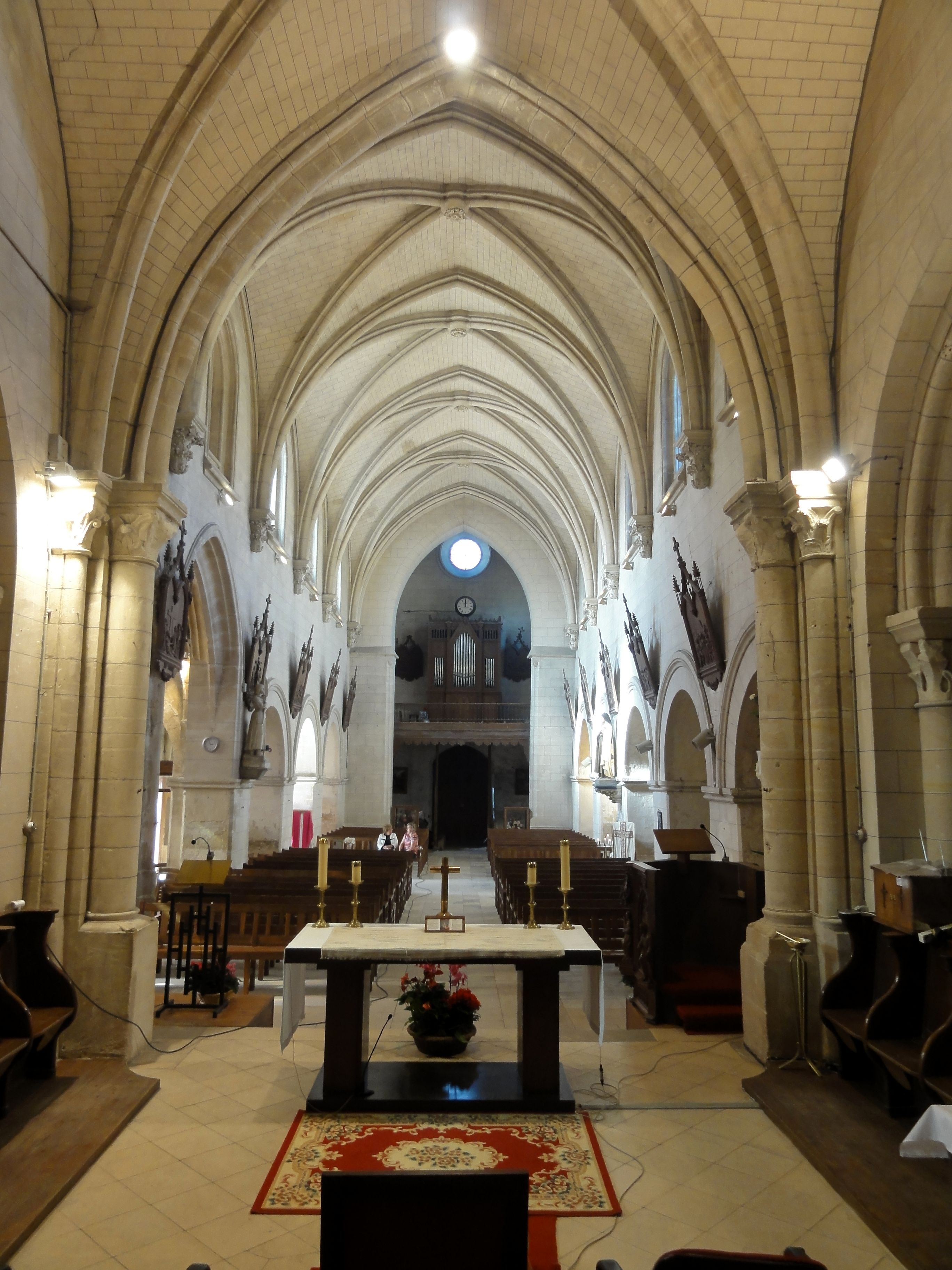 Chœur, 1ère travée, vue vers l'ouest.